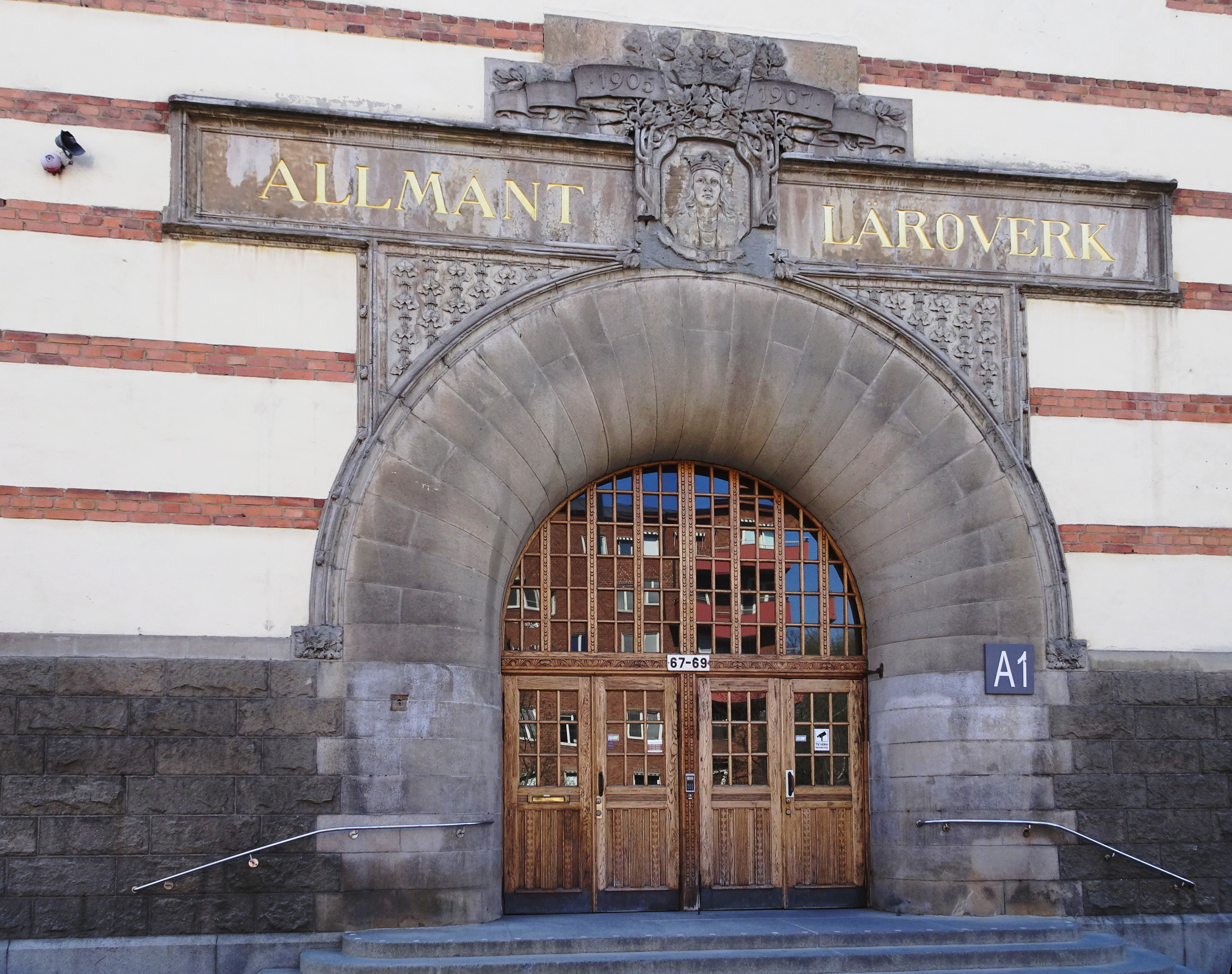 Kungsholmens gymnasium